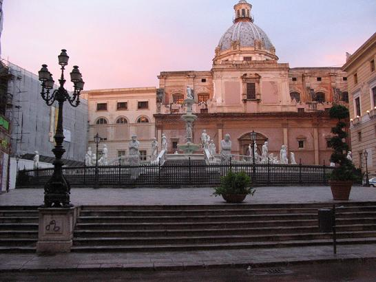 scattata da me. Fontana Pretoria, Palermo